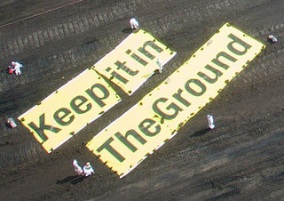 Blick auf den Tagebau Welzow Süd mit Ende Gelände Transparent "Keept it in the ground".